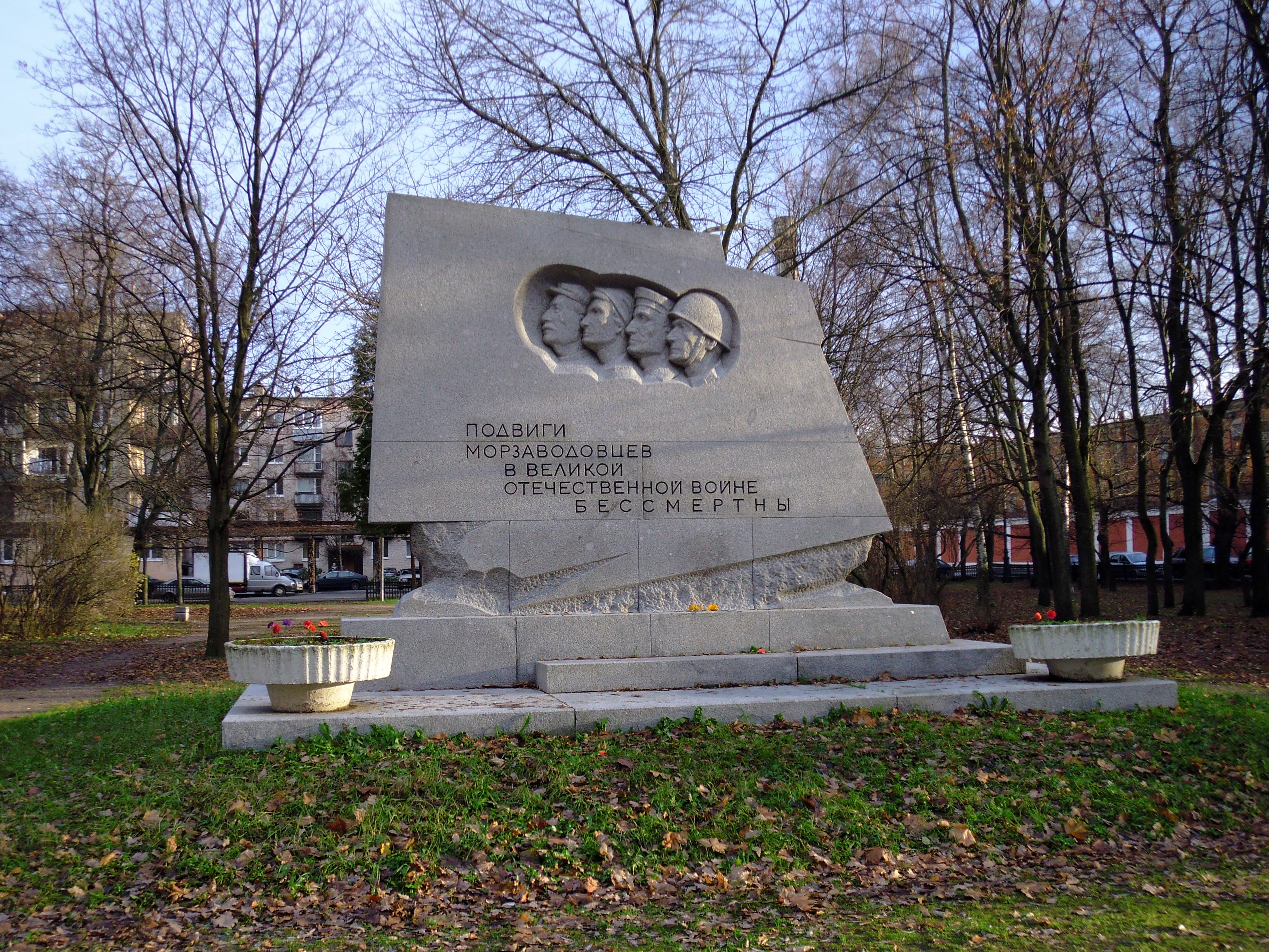 Кронштадт. Памятник работникам Морского завода павшим во время ВОВ